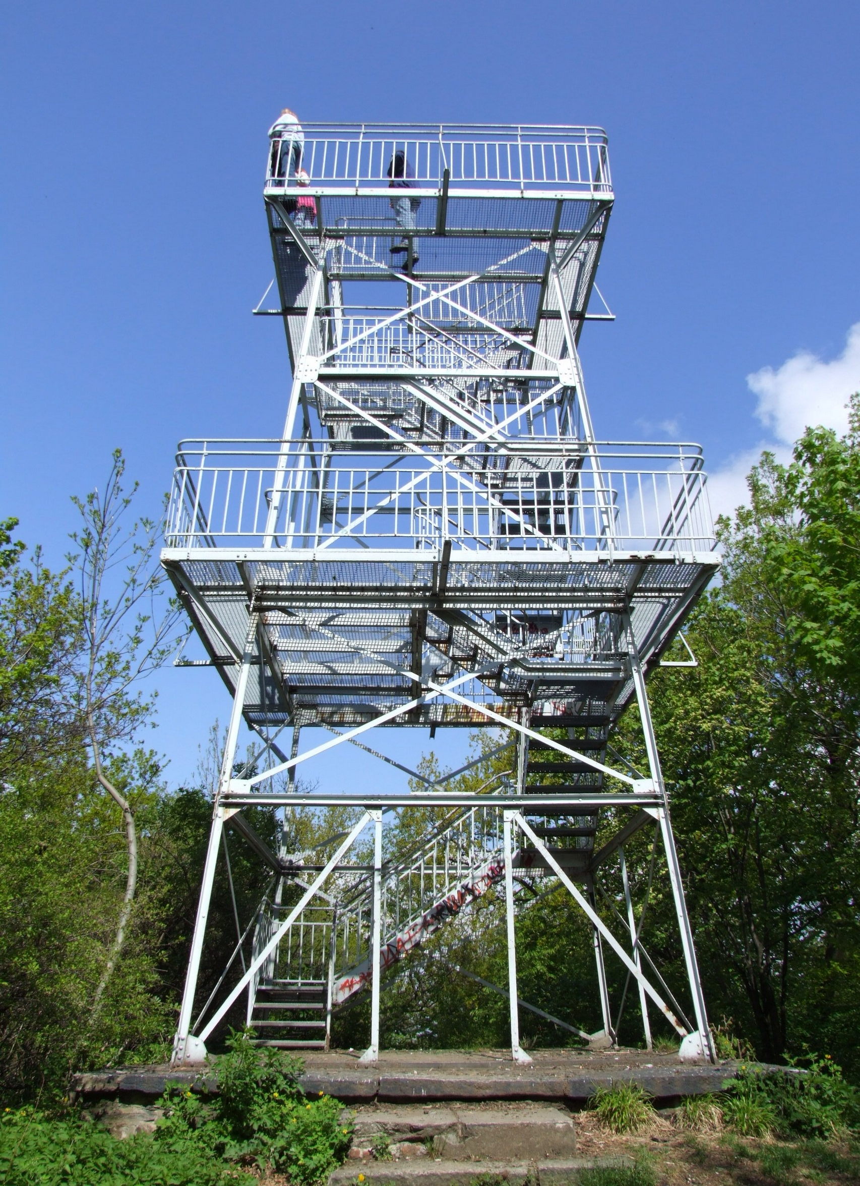 Rozhledna na Parkové hoře Góra Parkowa (něm. Herrleinberg) vedle města Bielawa (Langenbielau)